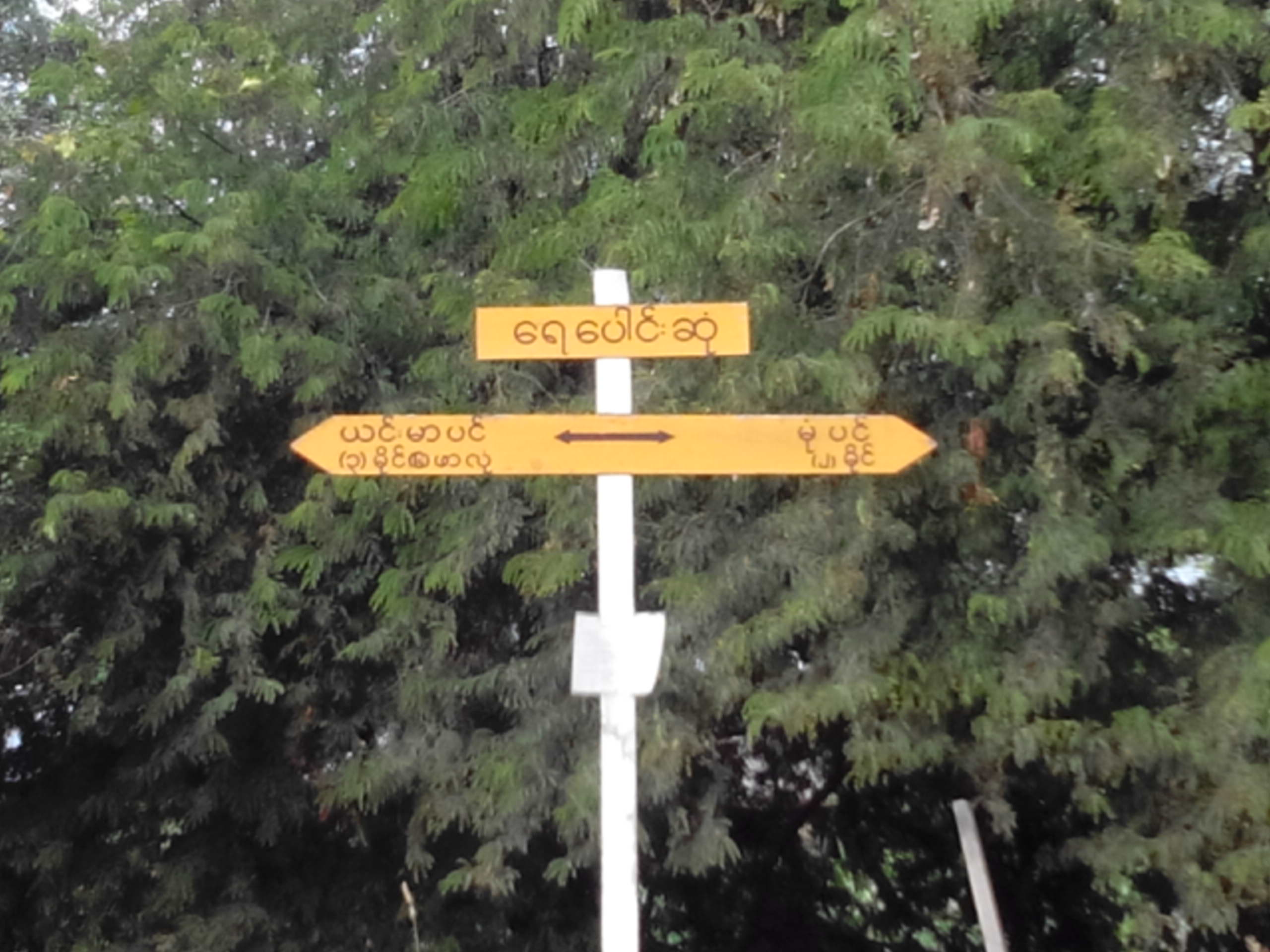 မြန်မာဘာသာ: ရေပေါင်းဆုံရွာ (သာစည်မြို့နယ်) လမ်းမိုင်တိုင် (၂၀၁၄ ဒီဇင်ဘာ)